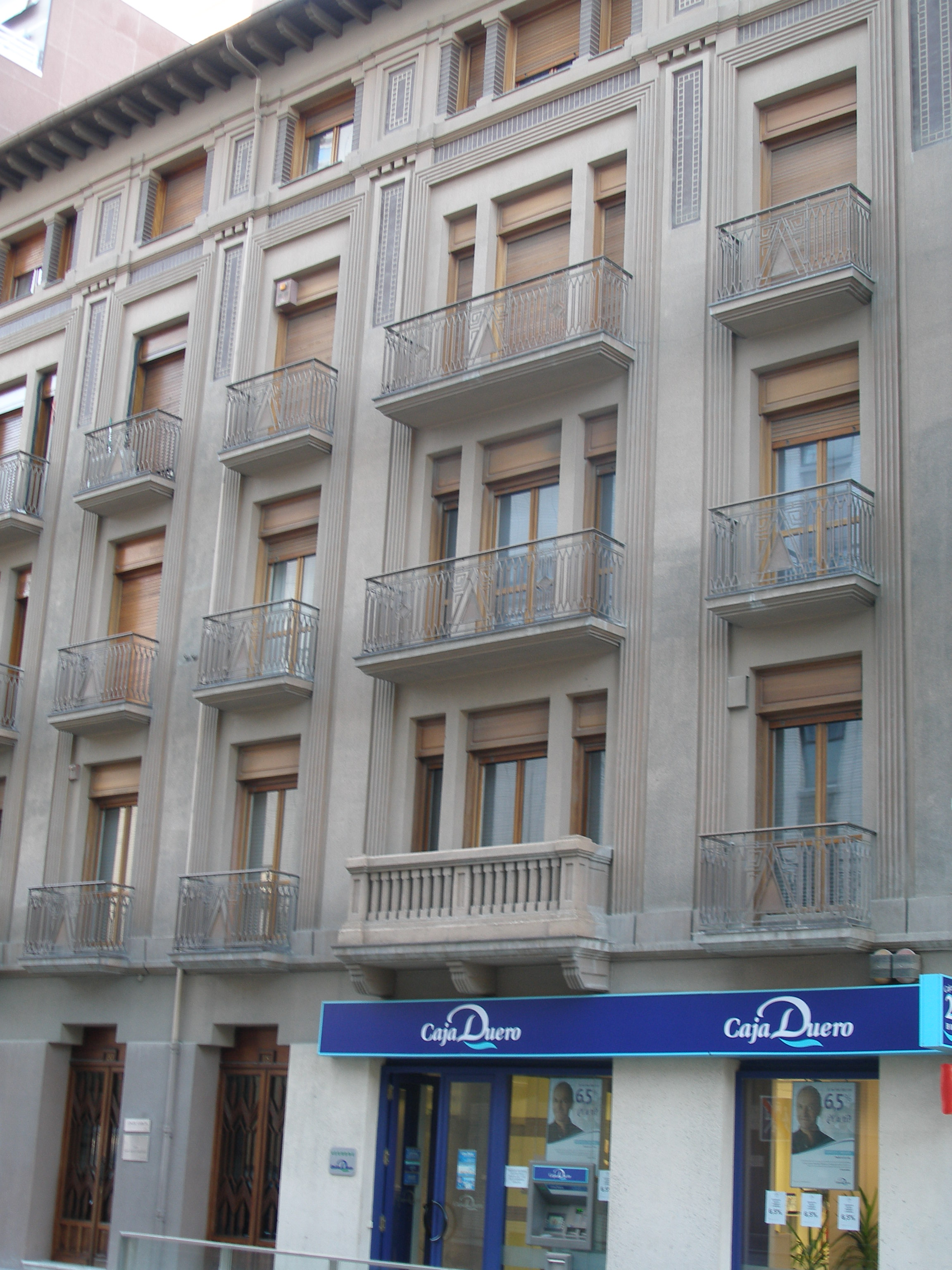 Edificio de la calle Leire de Pamplona.